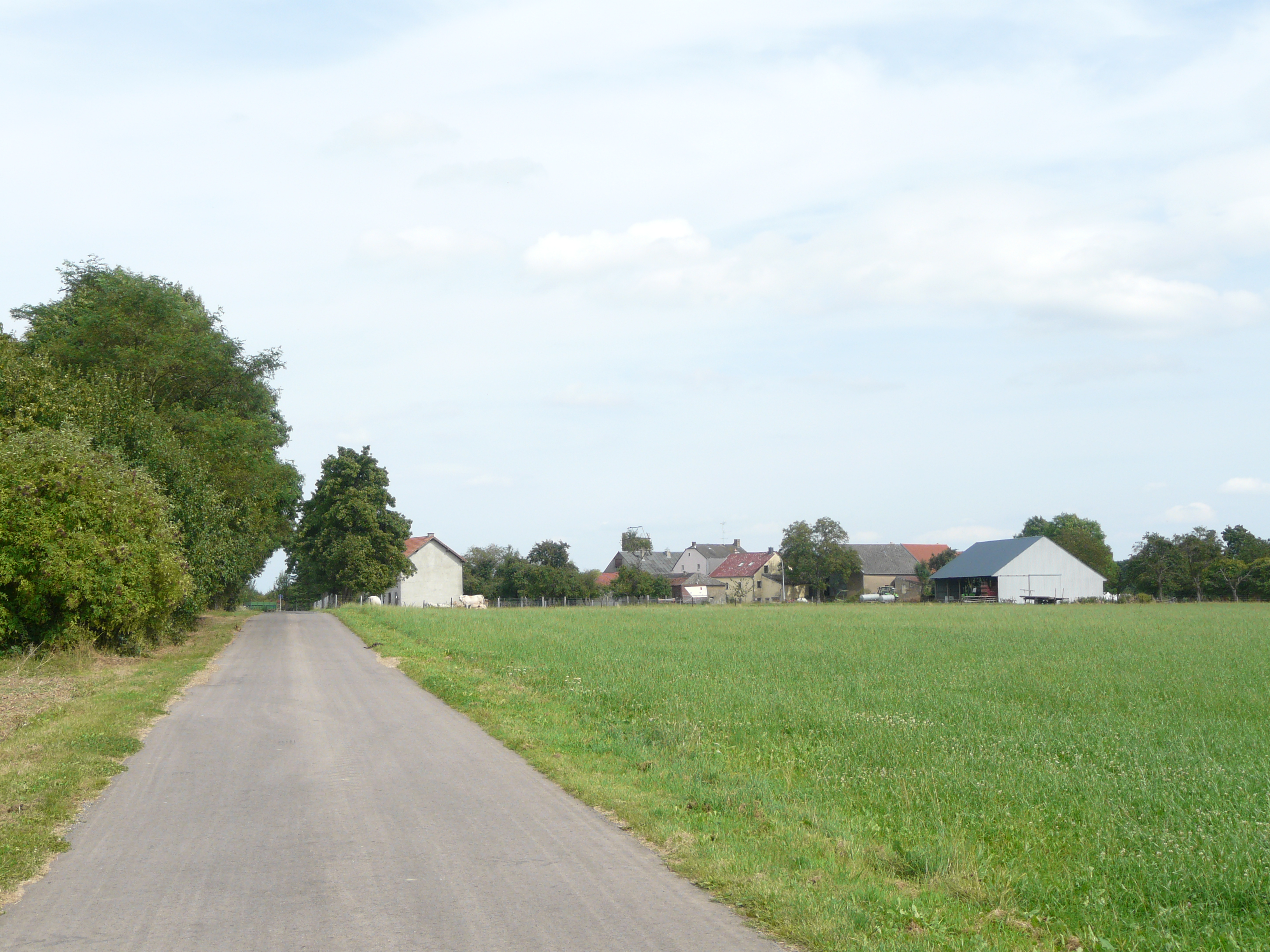 Landsbyen Bierkelt (eller Birkelt) i Bäerdref kommune